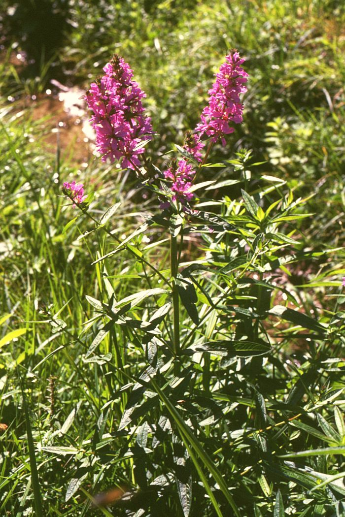 Gewöhnlicher Blutweiderich (Lythrum salicaria), Weiderichgewächse (Lythraceae) - Slowakei/Slovensko/Slovakia: Banskobystrický kraj, Okres Brezno, Vydrovo skanzen bei Čierny Balog